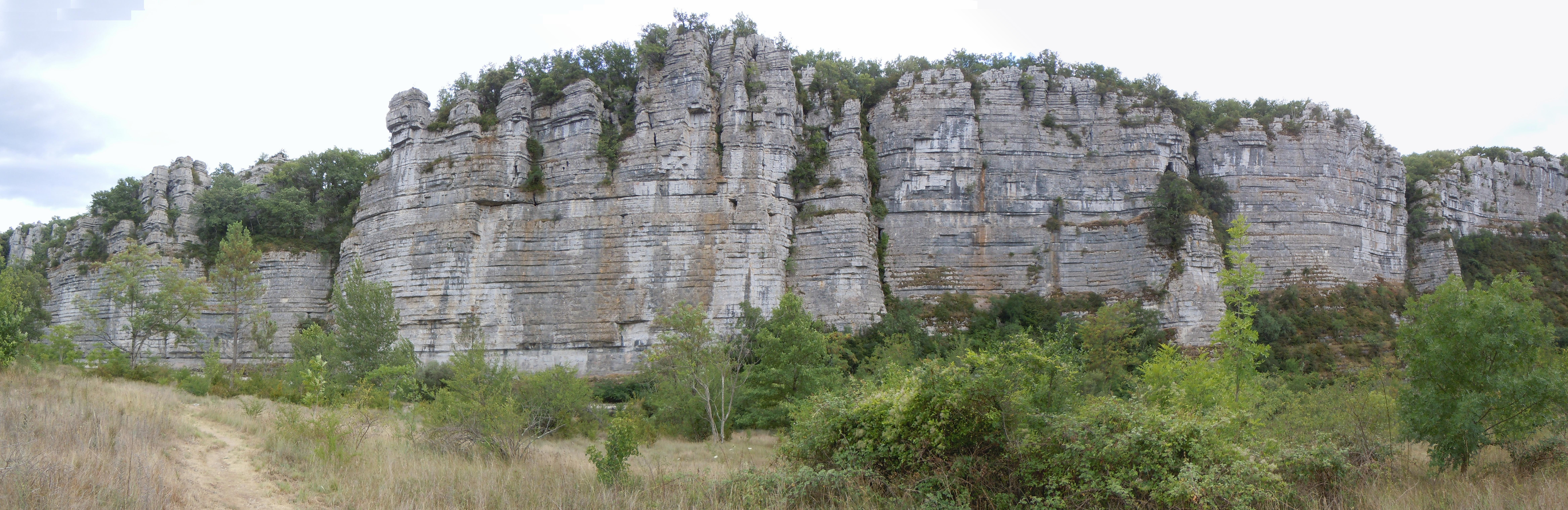 Cirque d'Endieu - Gorges du Chassezac - Ardèche - France